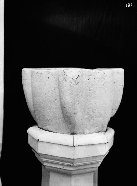 Dopfunt, ursprungligen vigvattensskål. Kategori: (04) DopfuntarDopfunt, ursprungligen vigvattensskål.